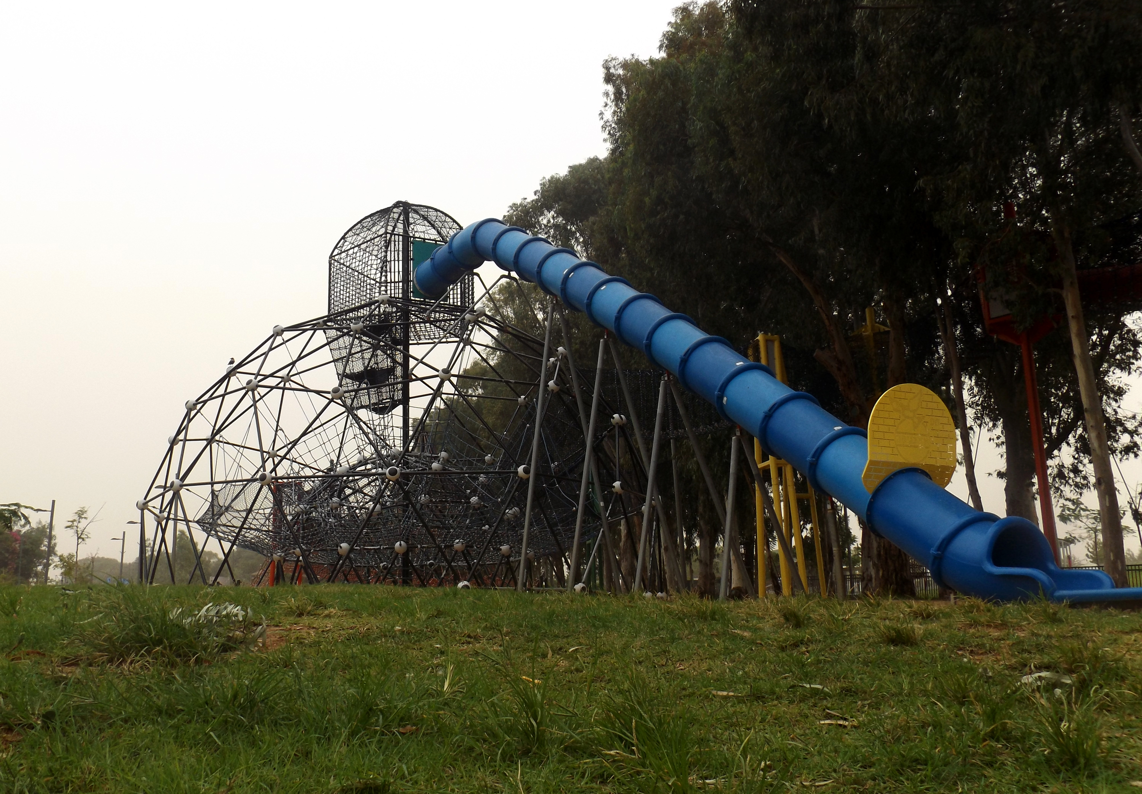 פרק הנצח אלון פלורנטין